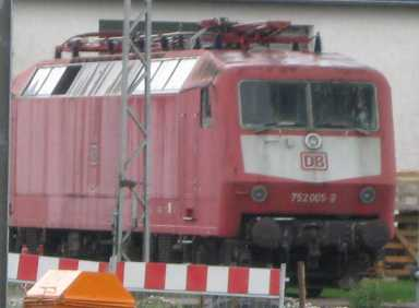 DBAG 752 005, die ehemalige 120 005 mit dem tiefer gezogenen Knick in der Frontpartie, im Mai 2009 im BZA München